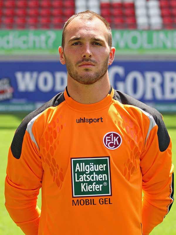 Tobias Sippel, Fußballtorwart